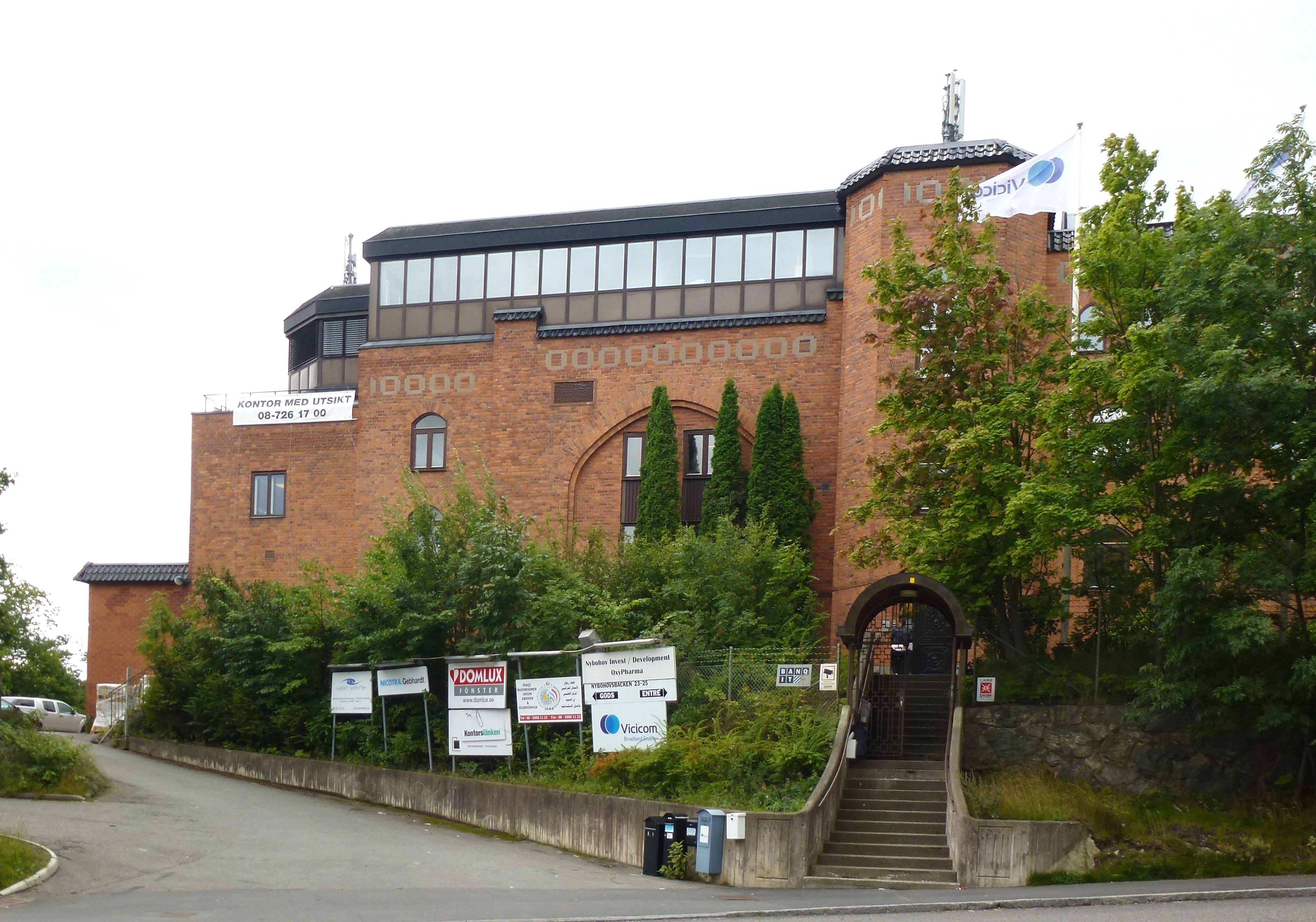 Nybohovsstationen i Liljeholmen stod klar 1914